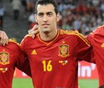 sergio busquets, 2012